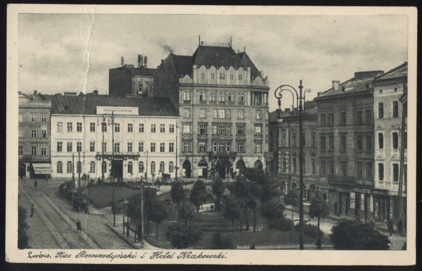 Сучасний Львівський апеляційний суд